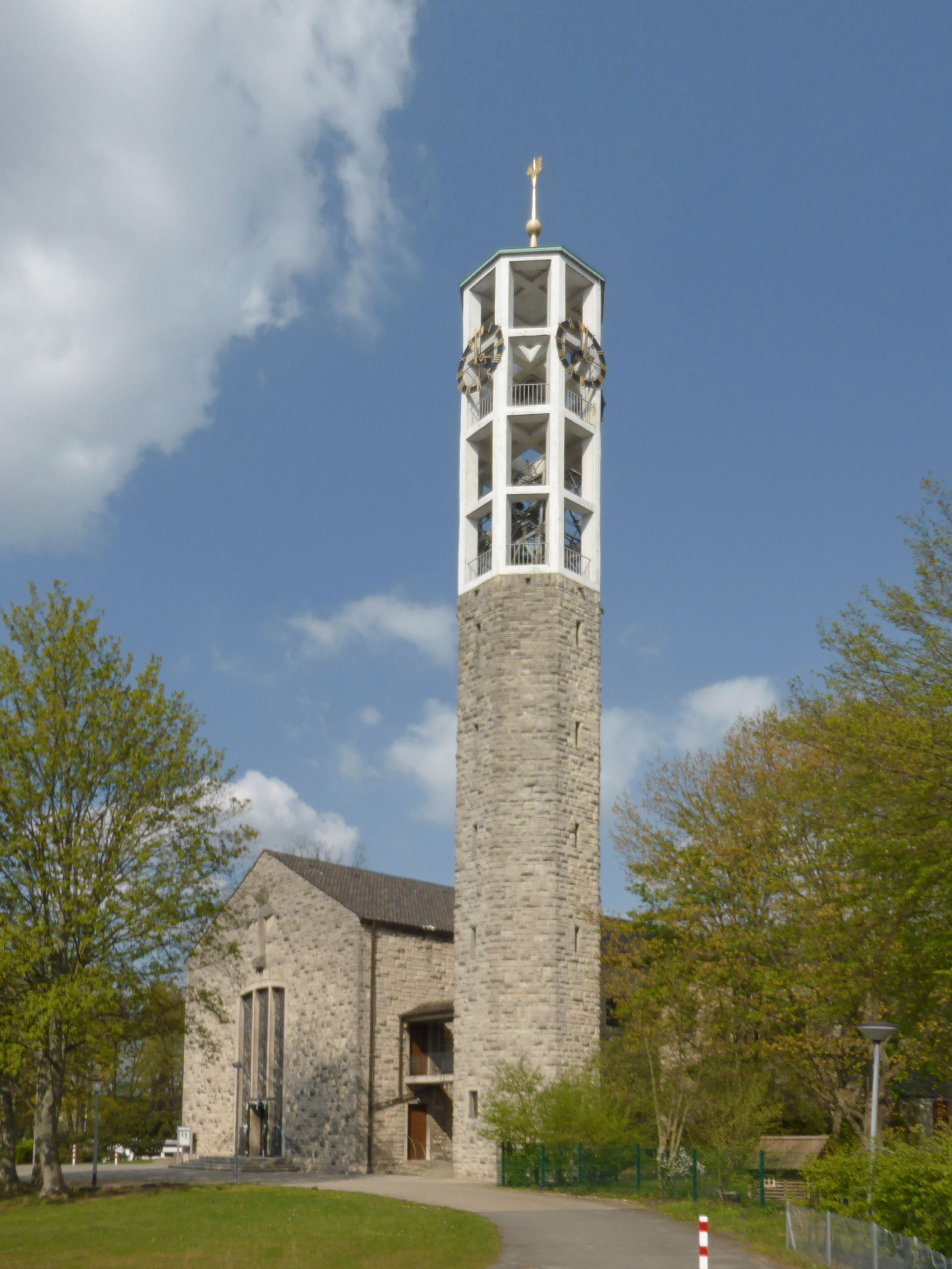 Evangelische Christuskirche in Wolfsburg.